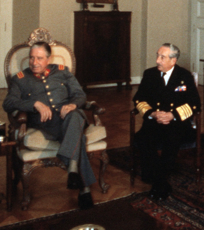 General Augusto Pinochet junto al Almirante Jose T. Merino Castro 06/01/1984